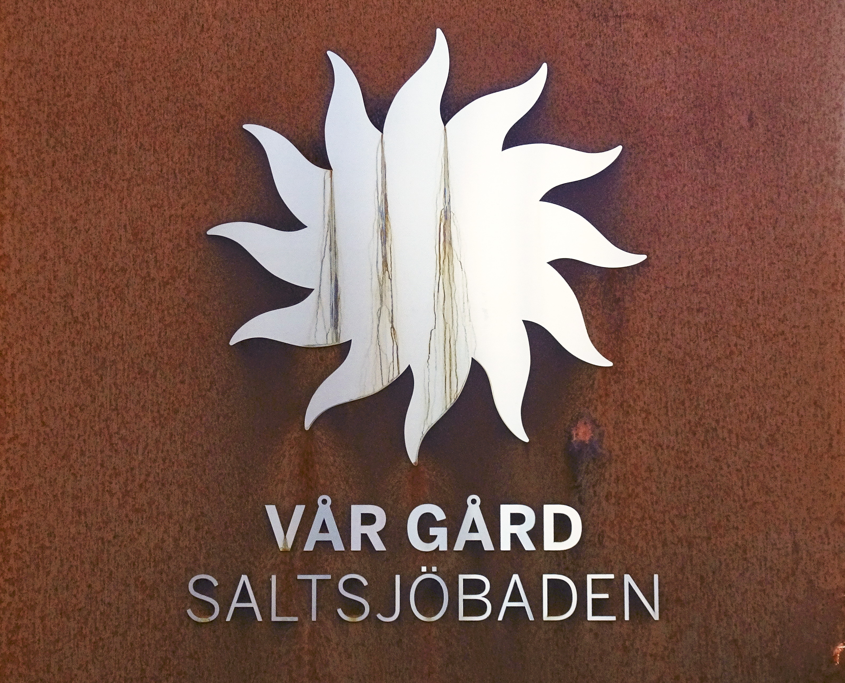 Vår gårds skylt vid entrén